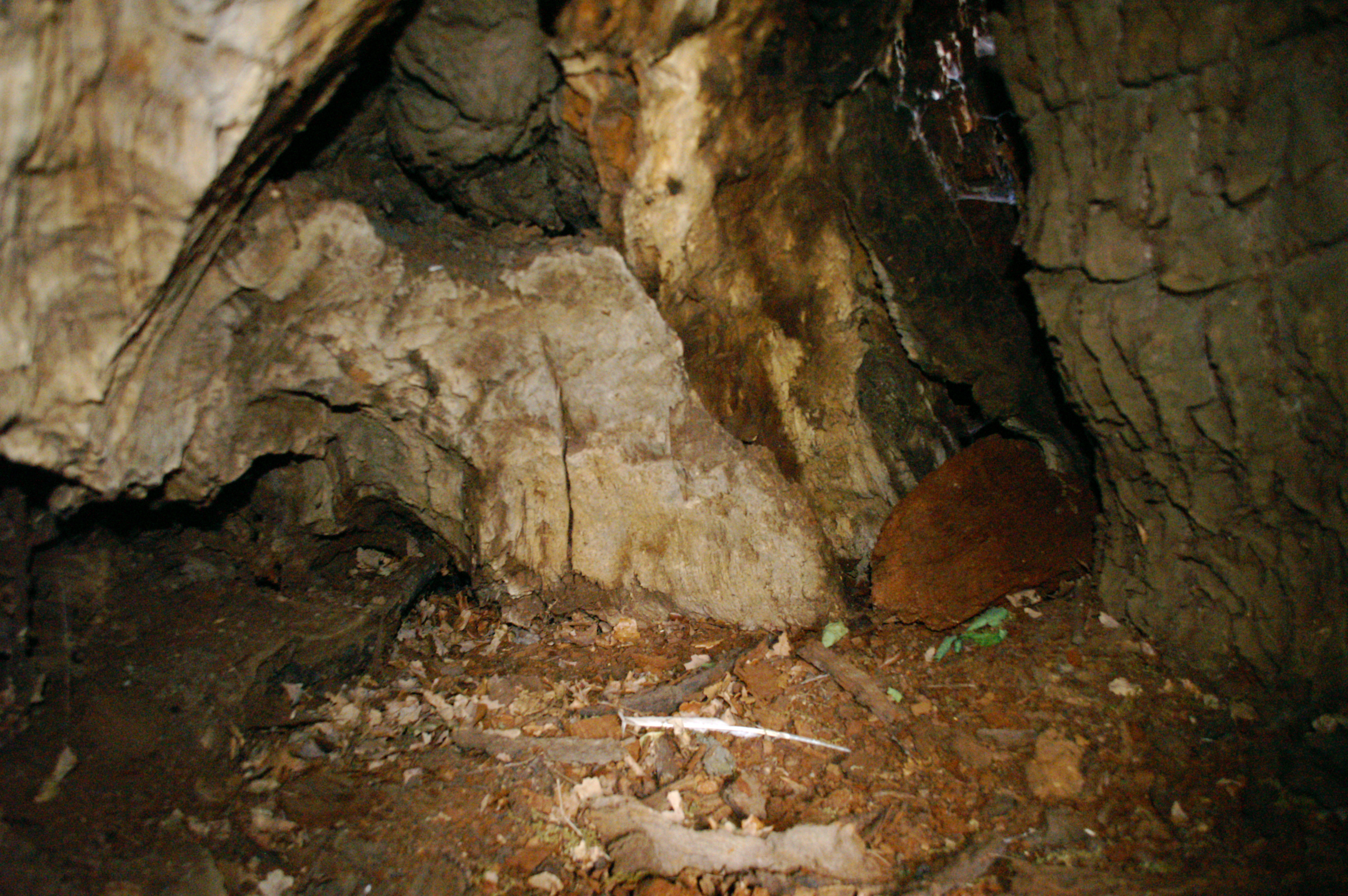 Oak in Noebdenitz, Germany